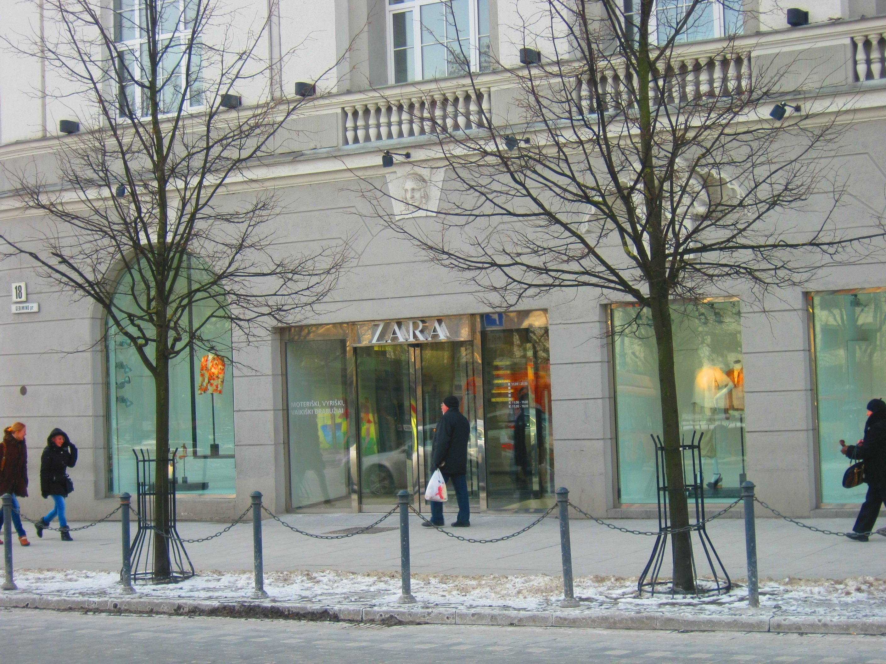 Vilnius